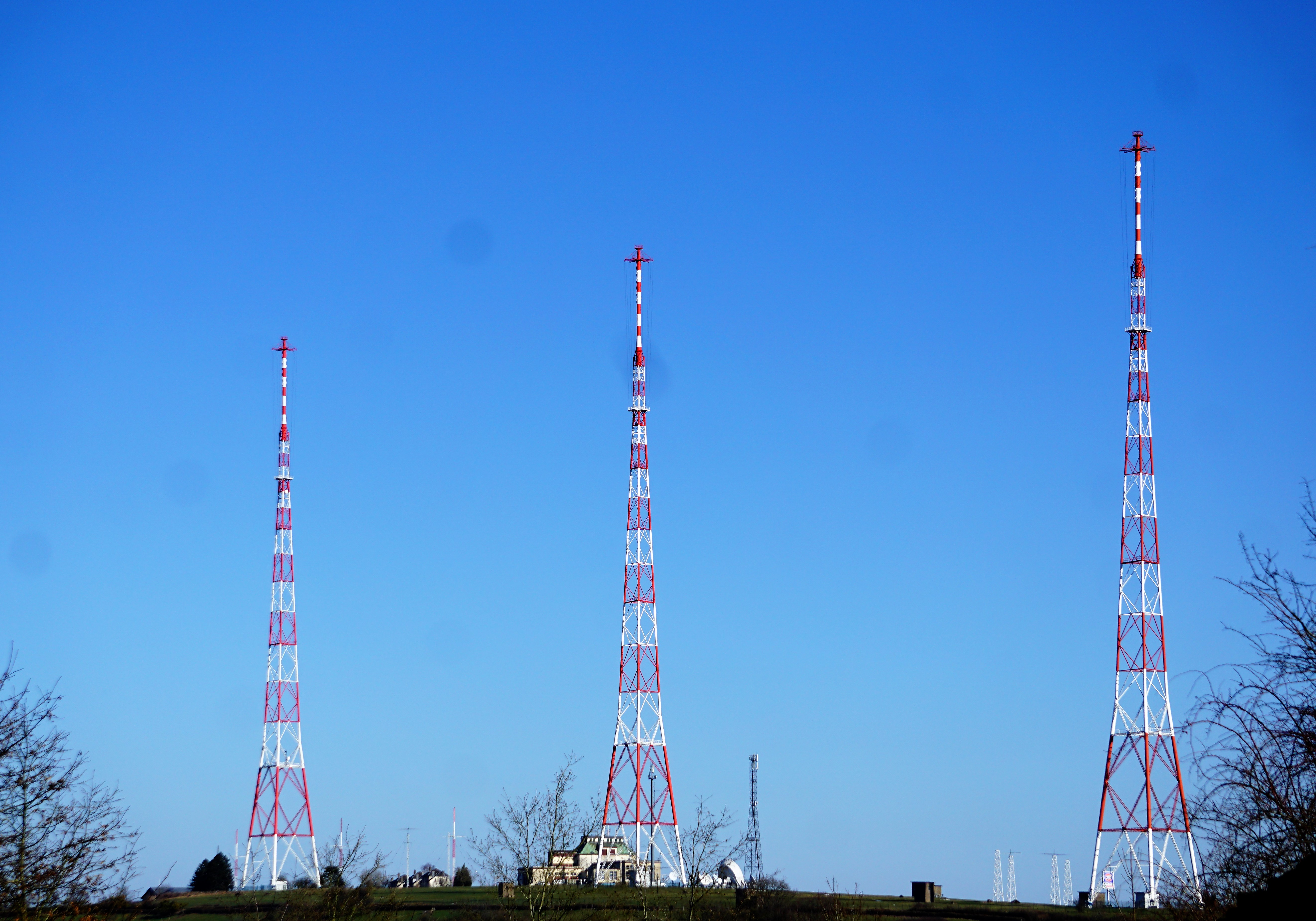 Junglinser, les trois mâts de l'émetteur. Vue de l'ouest.